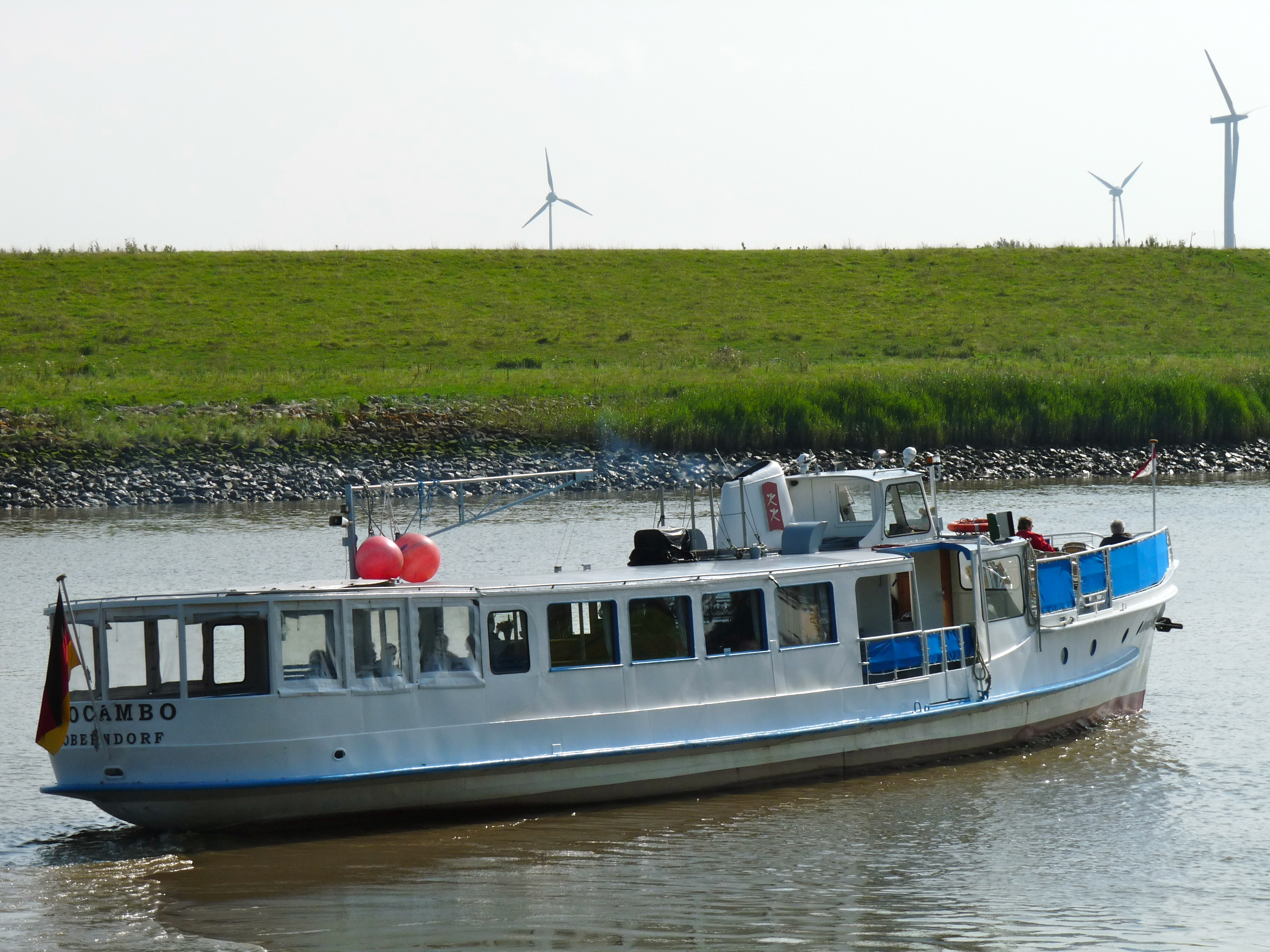 Das Motorschiff Mocambo auf der Fahrt durch die Oste (Nebenfluss der Elbe).